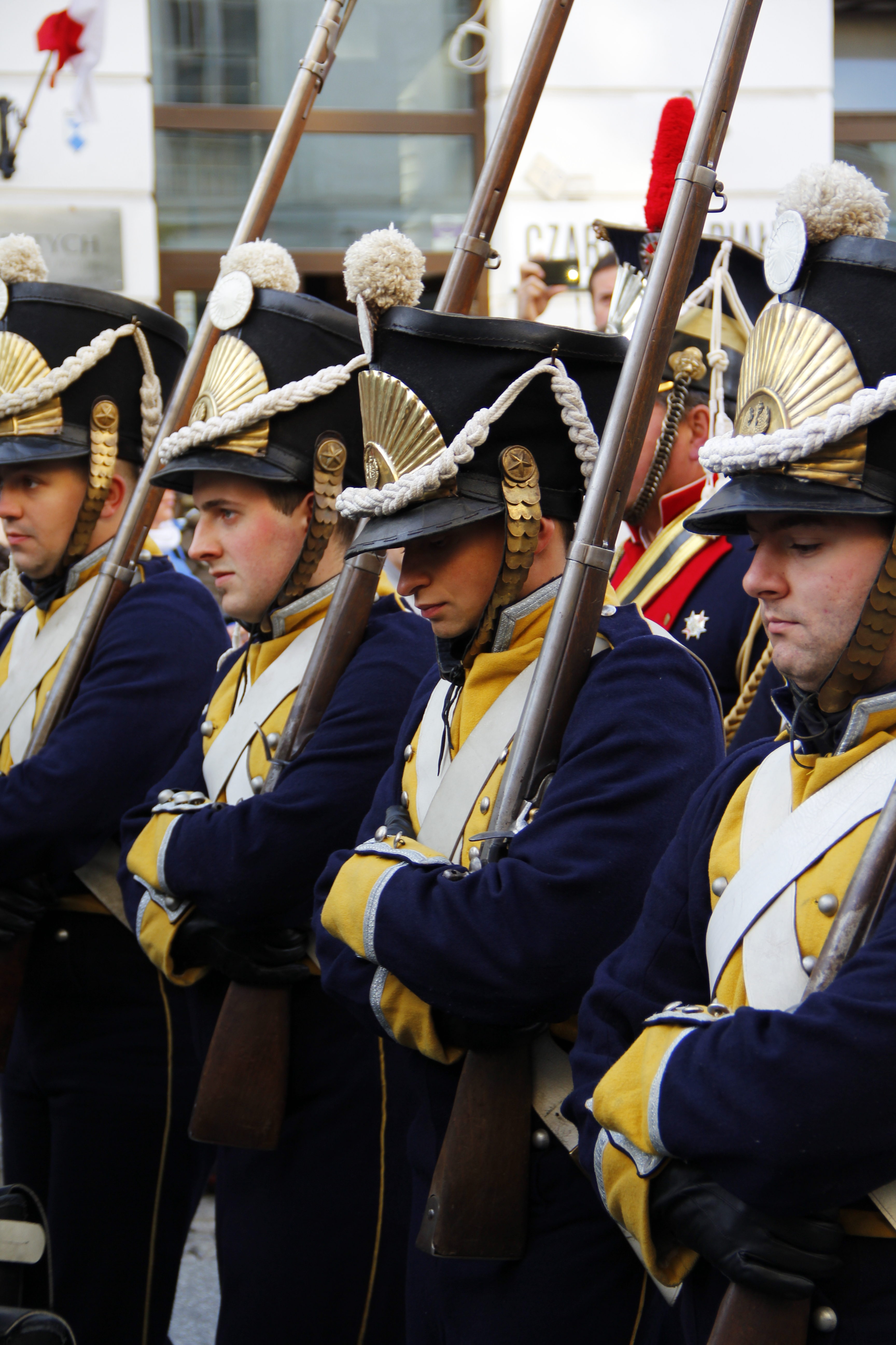 Independence Day Warsaw 2013